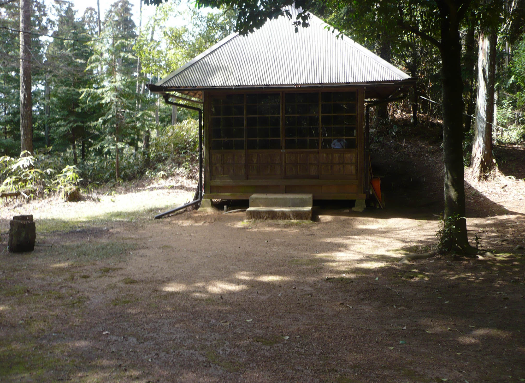 副郭